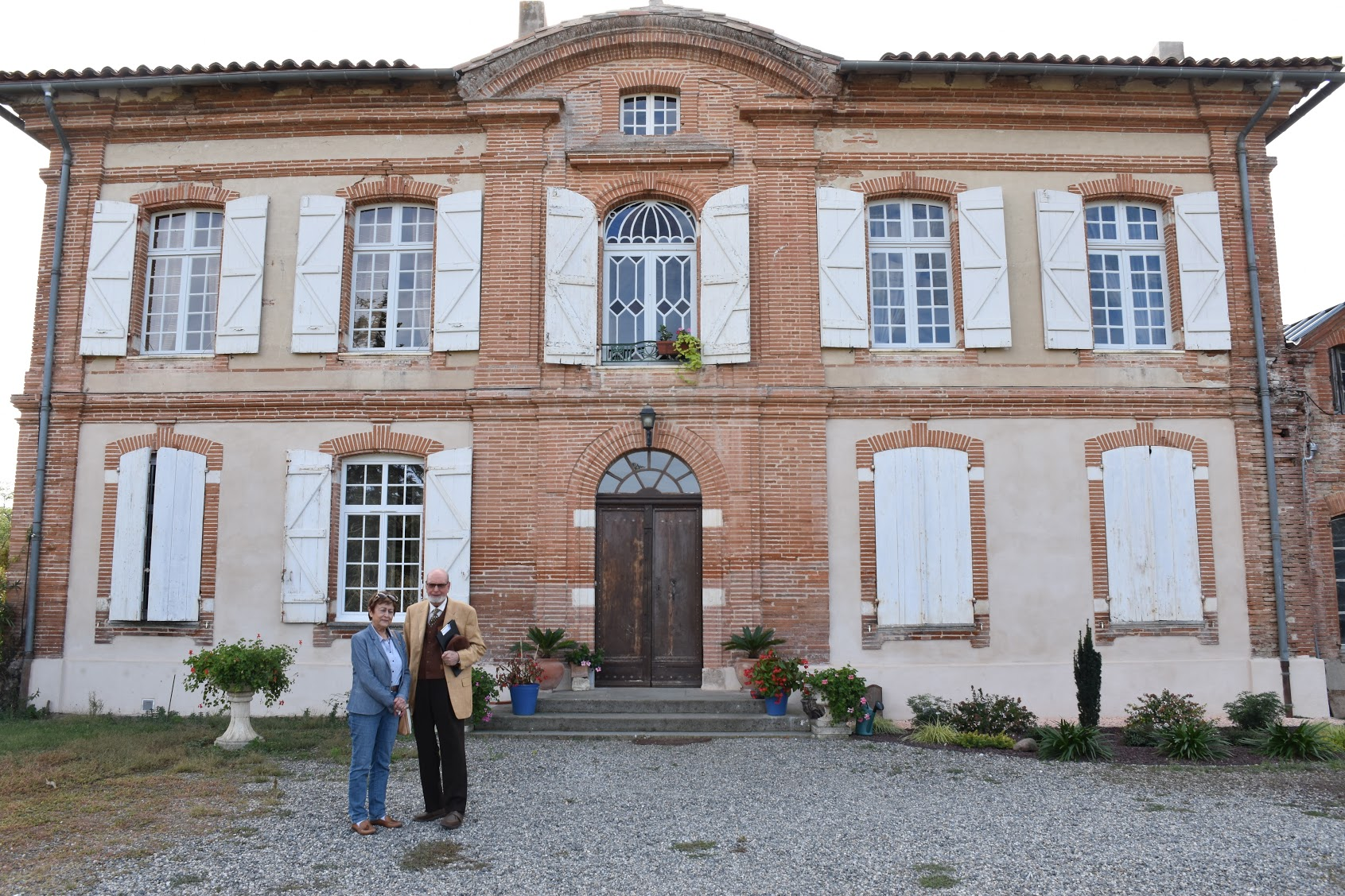 Façade du château d'Esquiré à Fonsorbes, ancienne demeure de Jean d'Aligny (1909-1991), résistant, avec Mme Janny Bonnet et M. Bernard Loubinoux du groupe mémoriel Jean d'Aligny